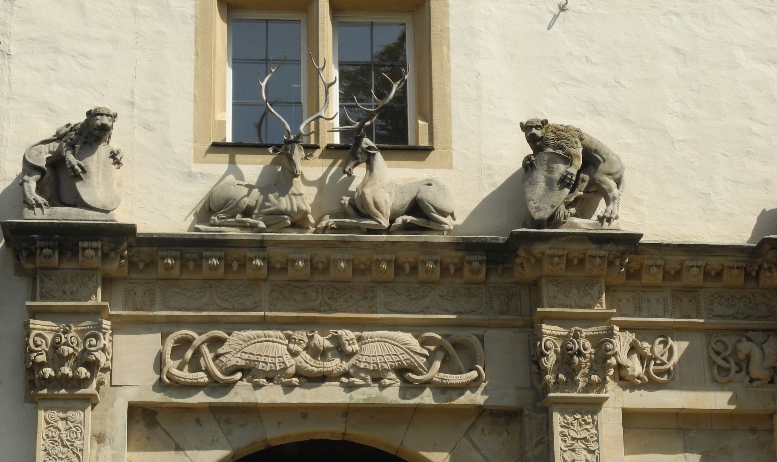 Göppingen - Schloss, Renaissancebau 1555–1568, Portal